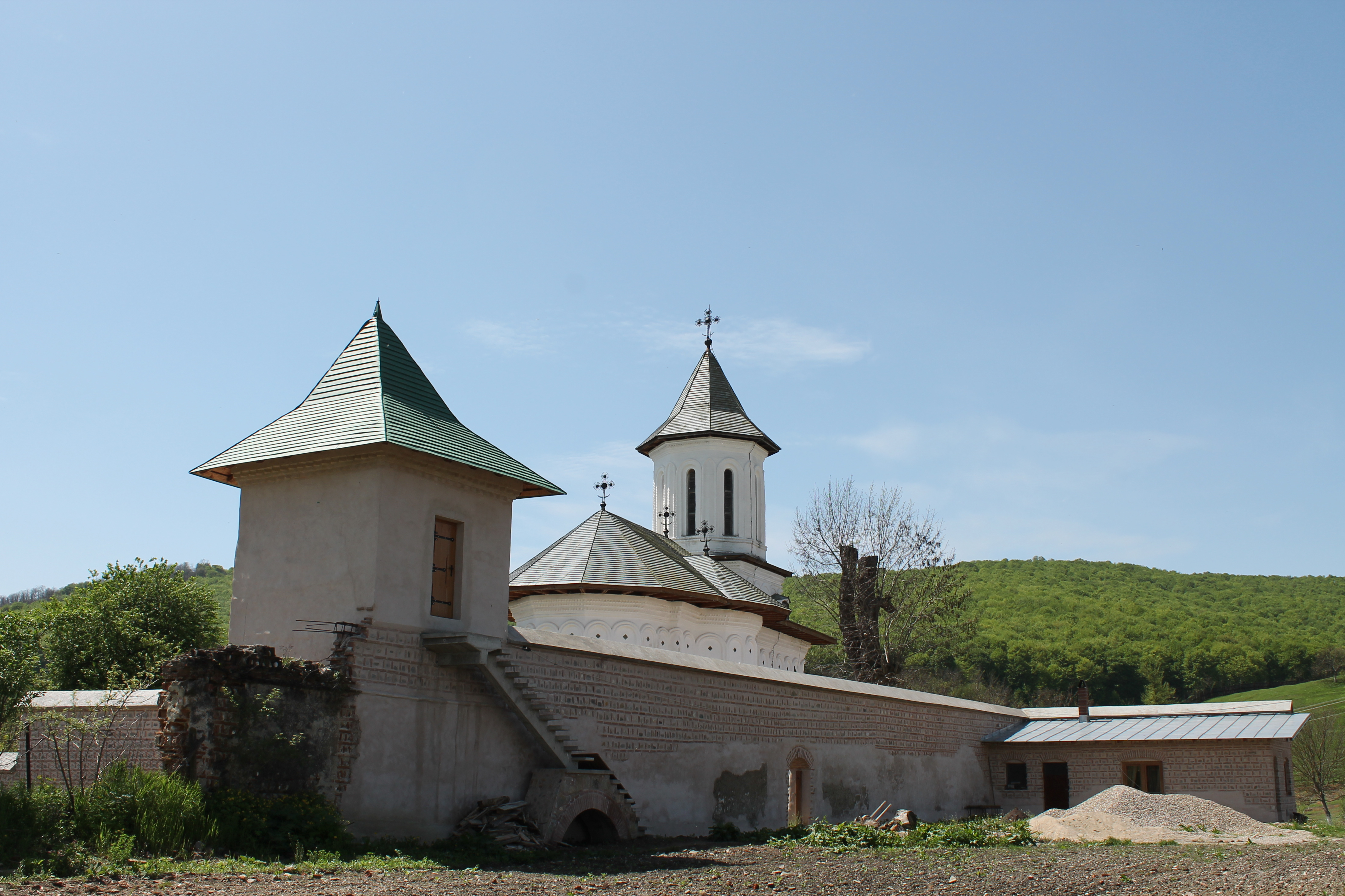 Sat Bajesti, comuna Balilesti, judet Arges Monument categoria A, secolul 17